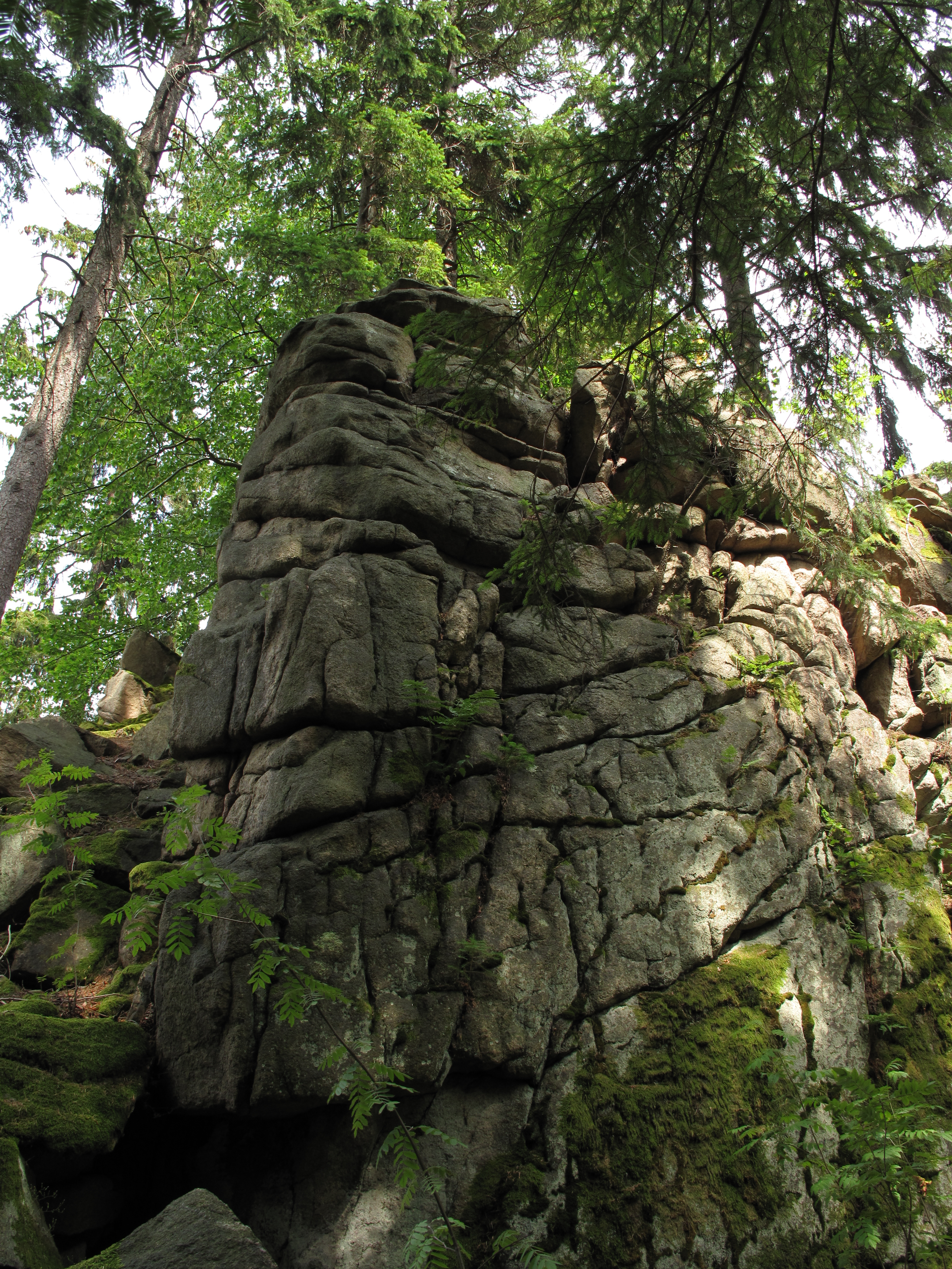 Přírodní památka Na Skalce (Hojkov). Okres Jihlava, Česká republika.